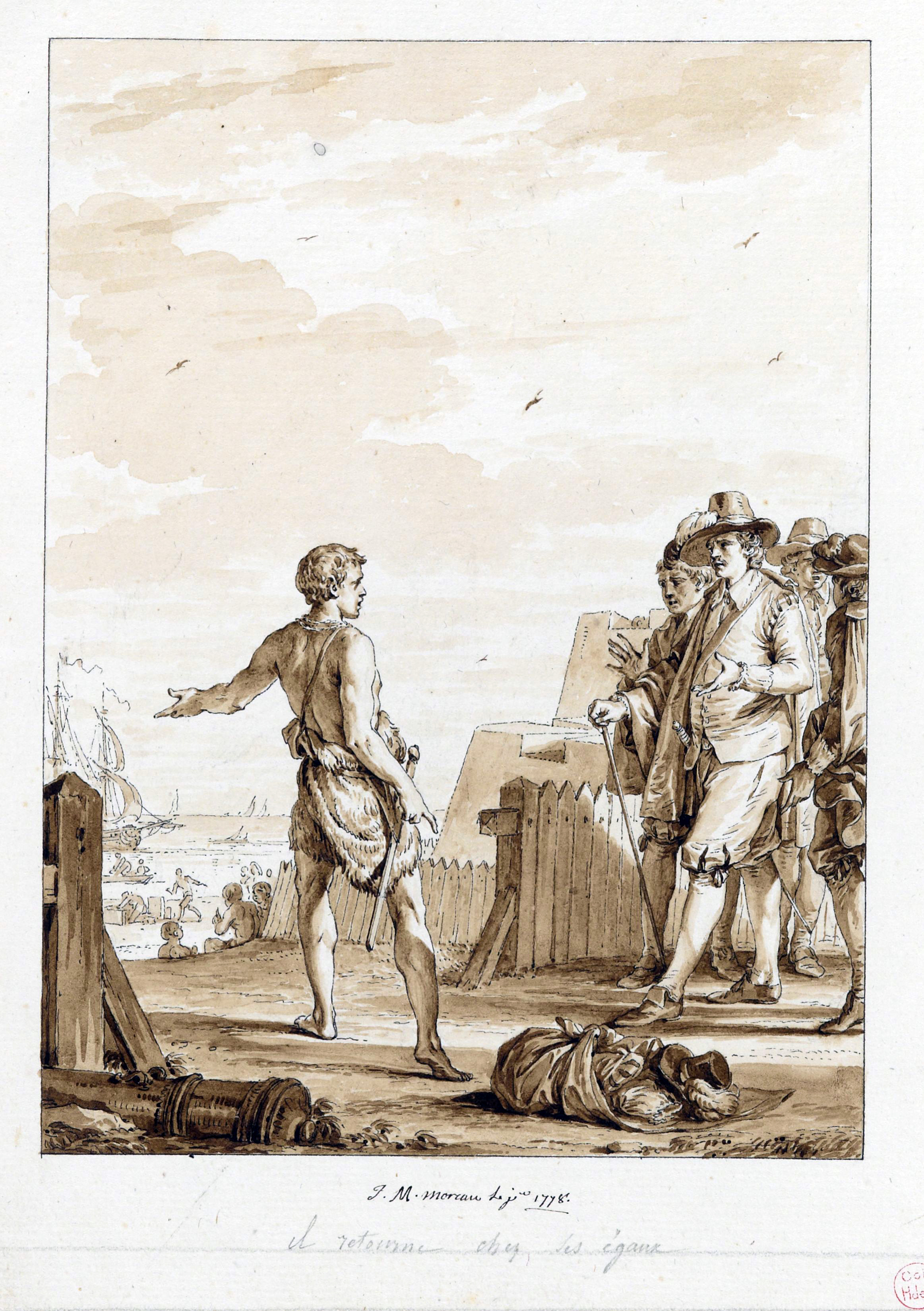 Illustration du Discours sur l'origine de l'inégalitéde Jean-Jacques Rousseau. Edition de Londres.